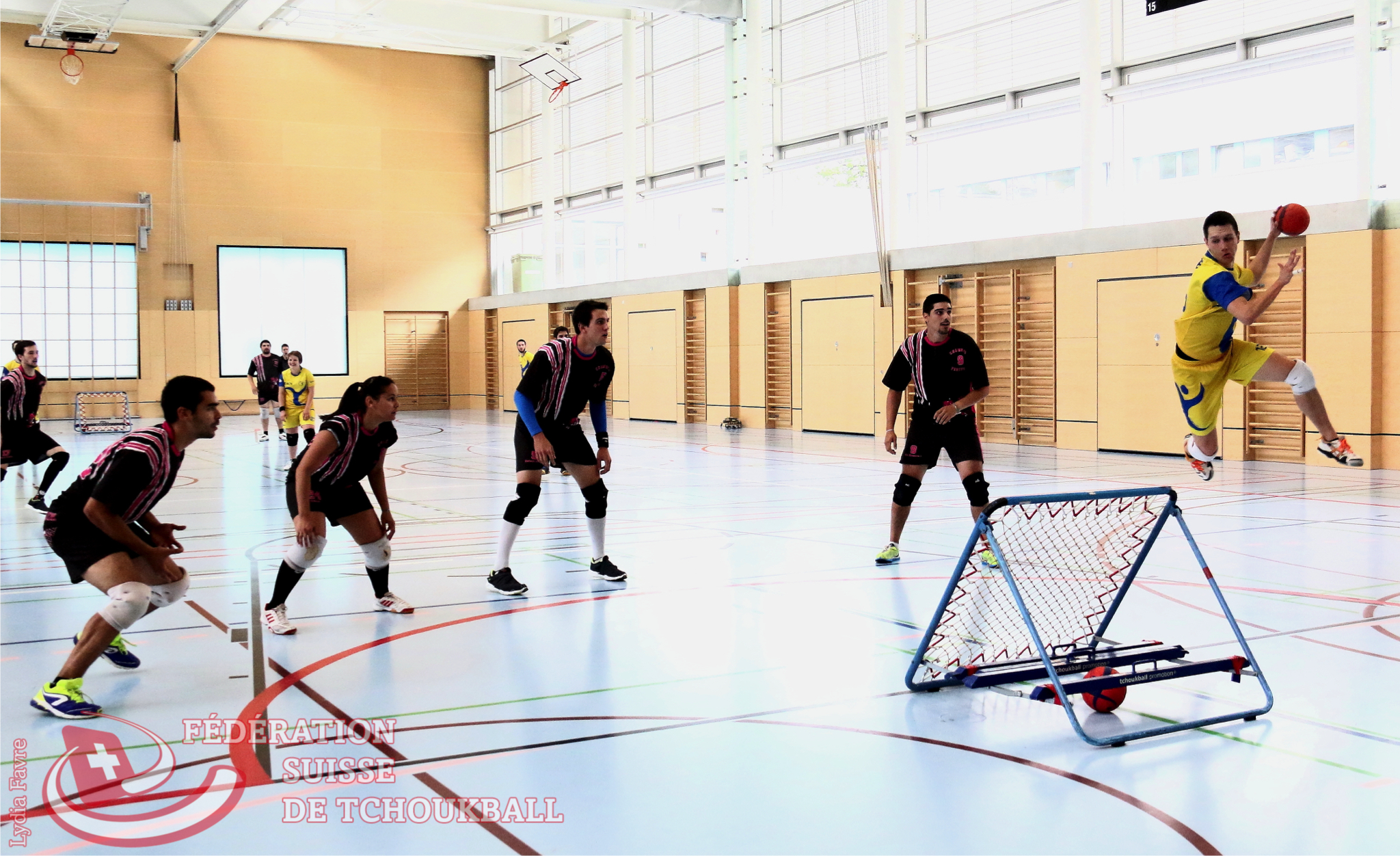 Attaque d'un chaux-de-fonnier sur une défense des Chambésy Panthers